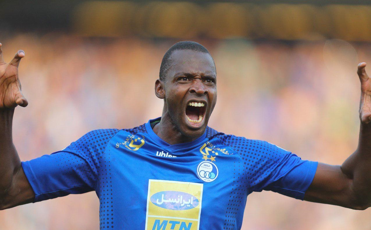 نگاره‌ای از دیدار دو تیم استقلال و صنعت نفت آبادان در ۱۴ آبان ۱۳۹۸ در ورزشگاه آزادی که تیم استقلال با نتیحه ۵-۰ پیروز دیدار شد. (مشاهده گزارش بازی)